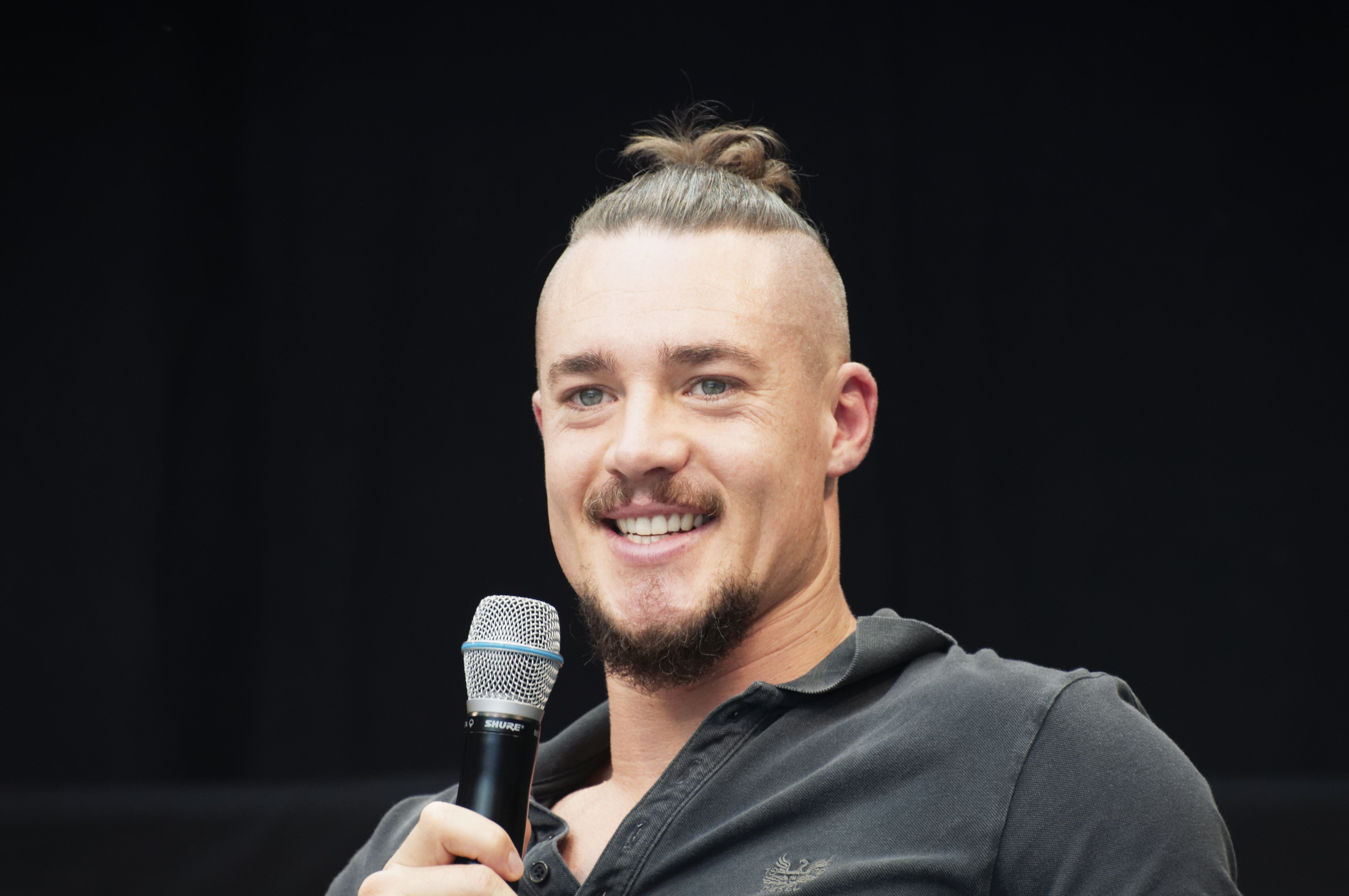 Bilder von der Comic Con Germany 2019 in Stuttgart